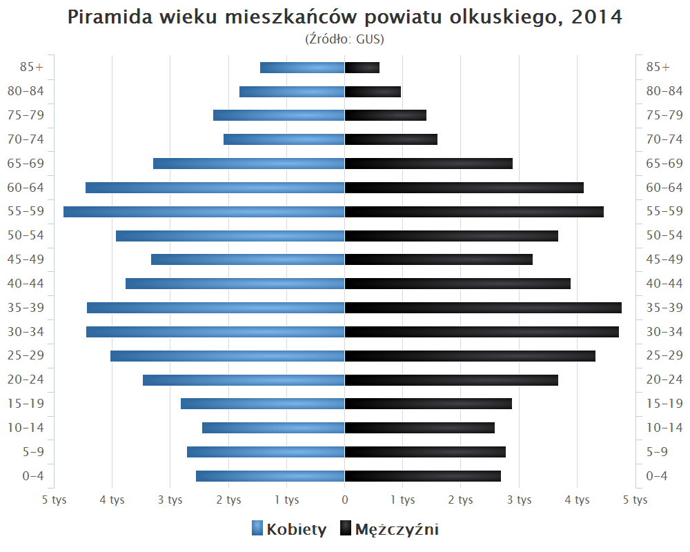 Piramida wieku mieszkańców powiatu olkuskiego, 2014